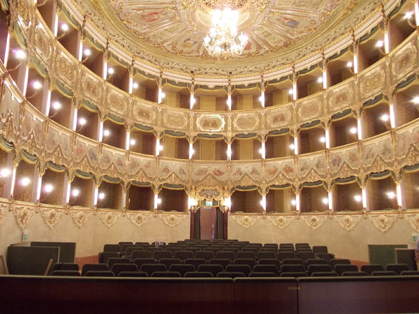 La vista dall'interno del Teatro Sociale di Bergamo